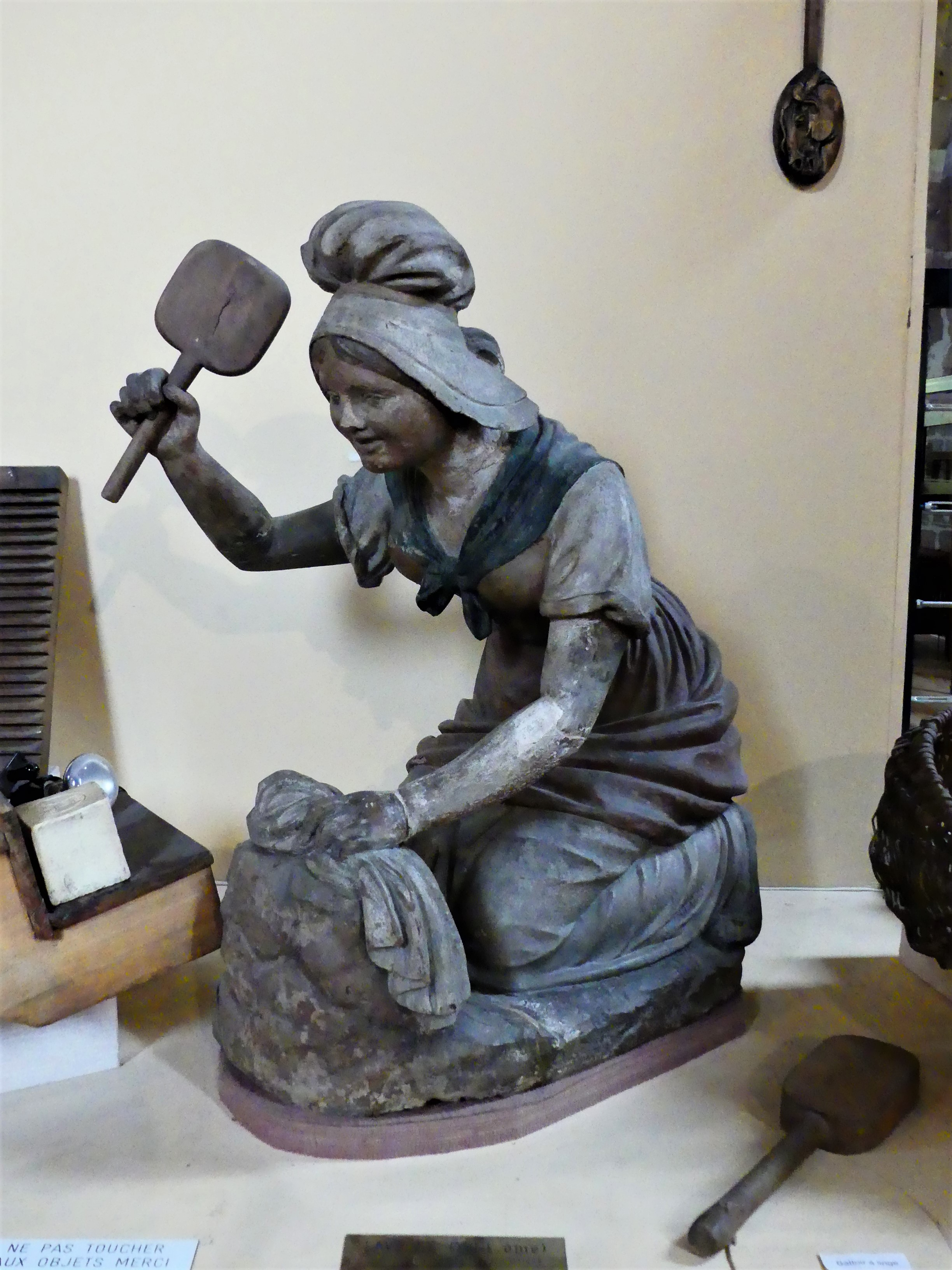 Statue du XVIIIe siècle en terre cuite représentant une laveuse, musée Joseph-Vaylet, Espalion, Aveyron, France.